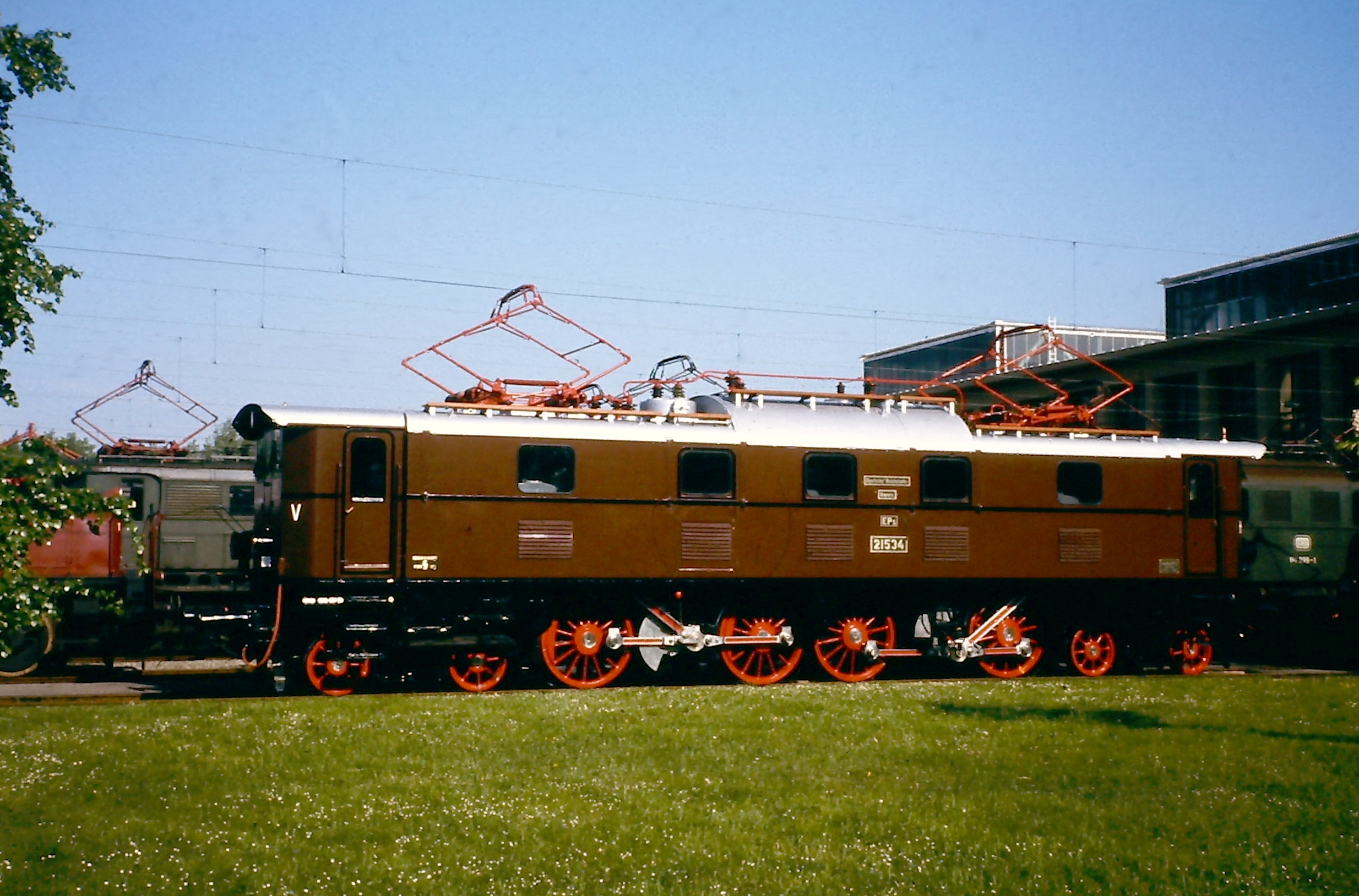 E 52 34, ausgestellt in der Fahrzeugschau 100 Jahre elektrische Eisenbahn im AW München-Freimann